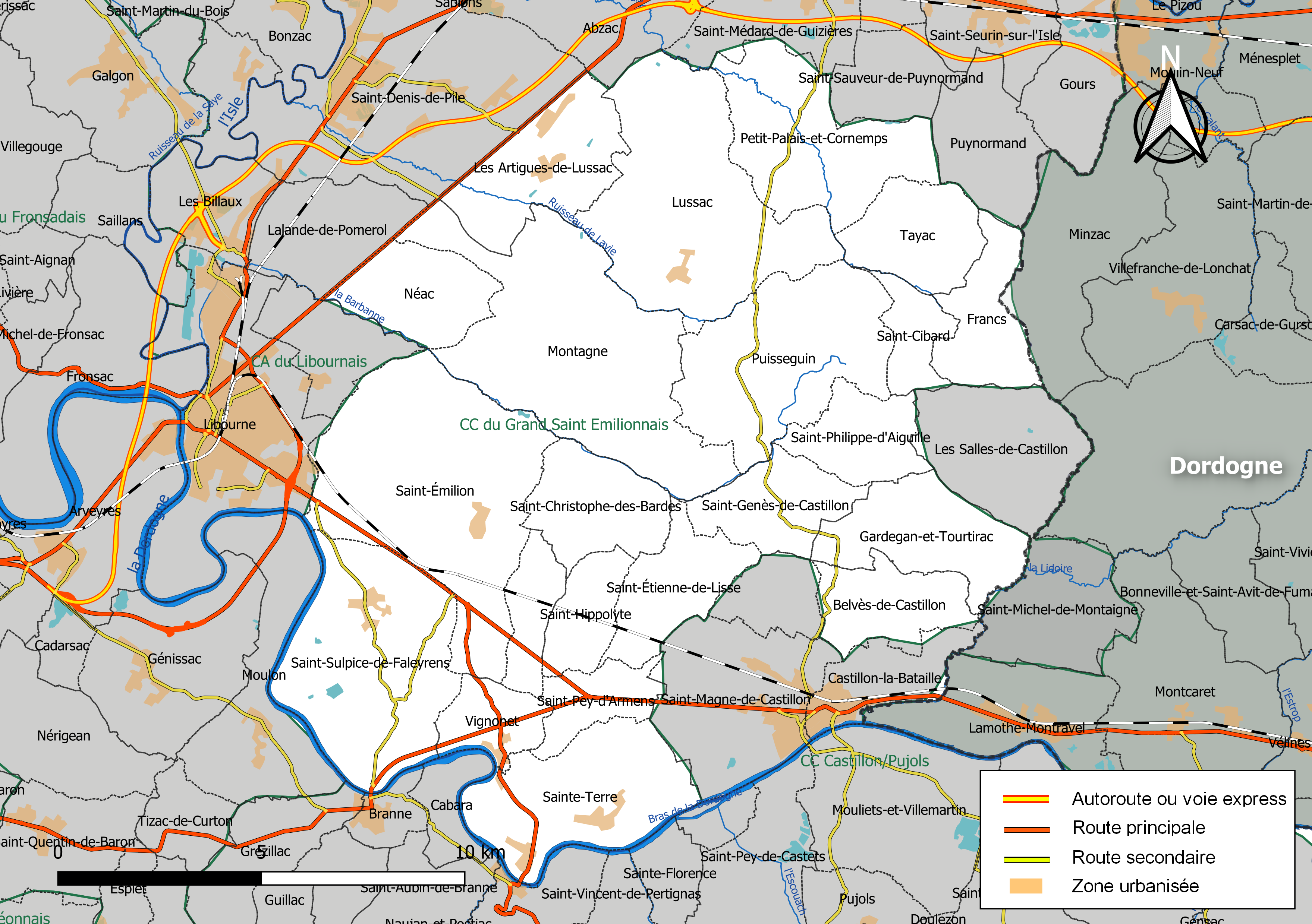 Carte géographique de la Communauté de communes du Grand Saint-Émilionnais, département de la Gironde, France. Composition au 1er janvier 2019.